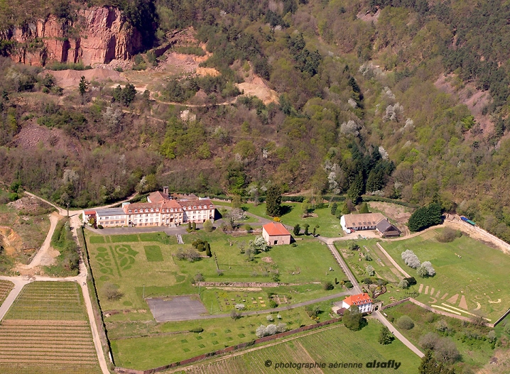 Abbaye de Marbach en 2015 sous les falaises de grès rose